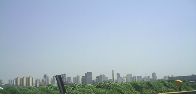 Centro financeiro de Guarulhos.